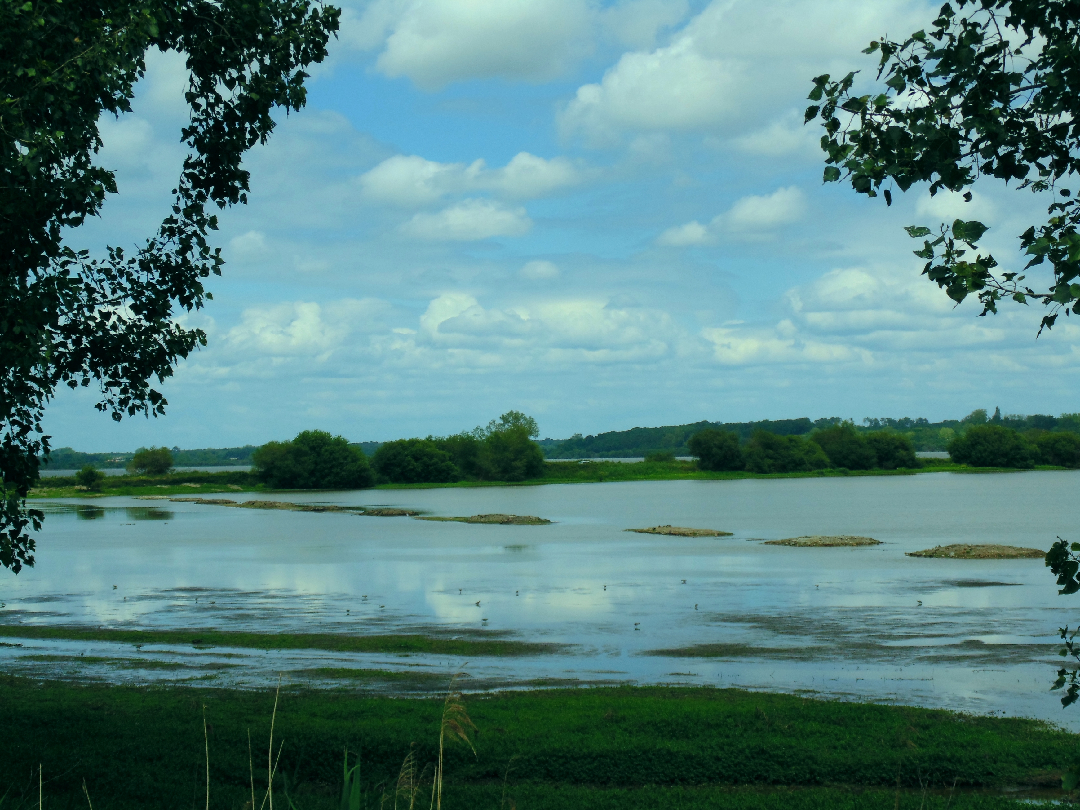 vue partielle du Marais d'Orx depuis un chemin de promenade aménagé. Des oiseaux sont visibles entre la berge et les ilots.